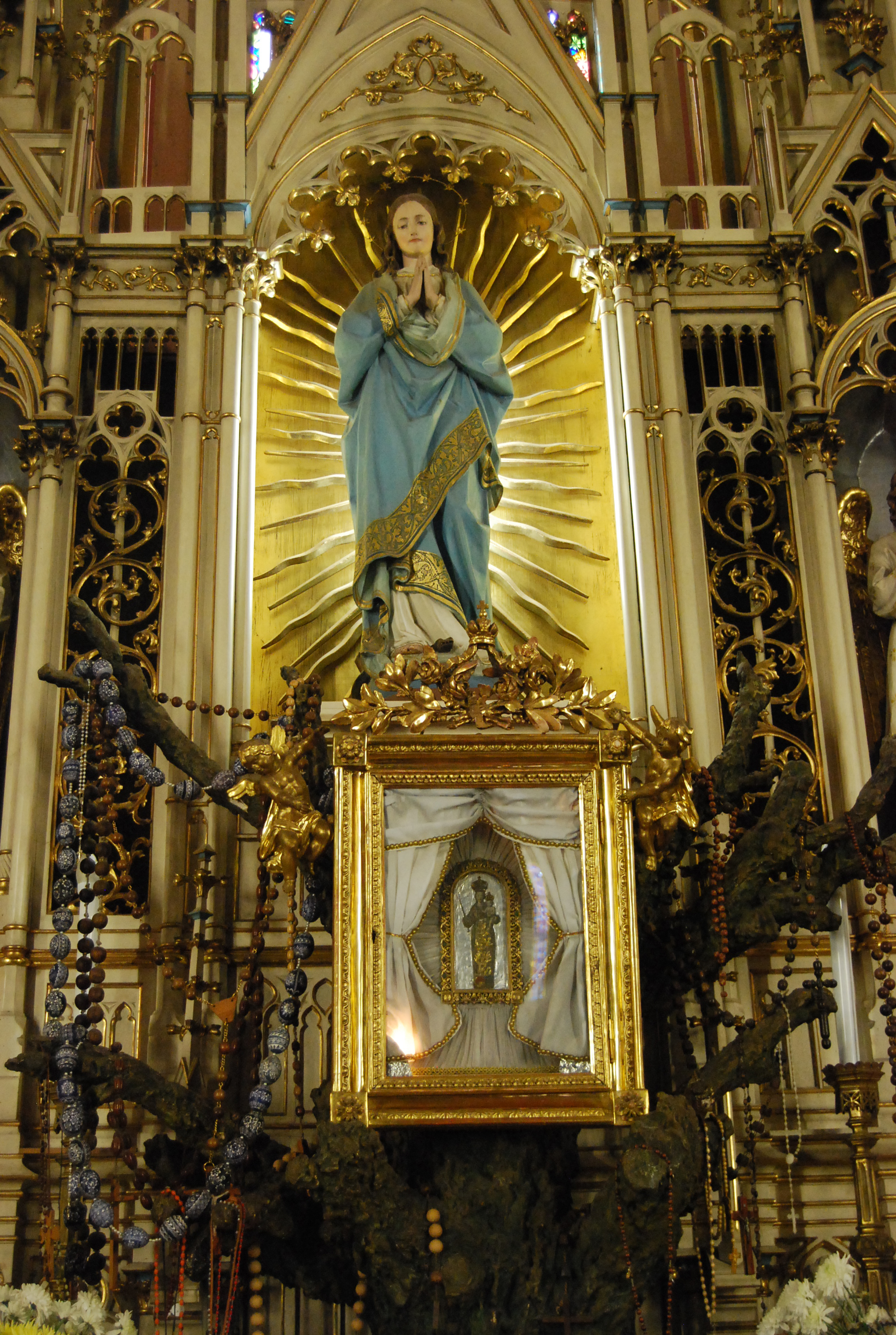 Máriaremetei templom szentélye, Mária kegyszobor